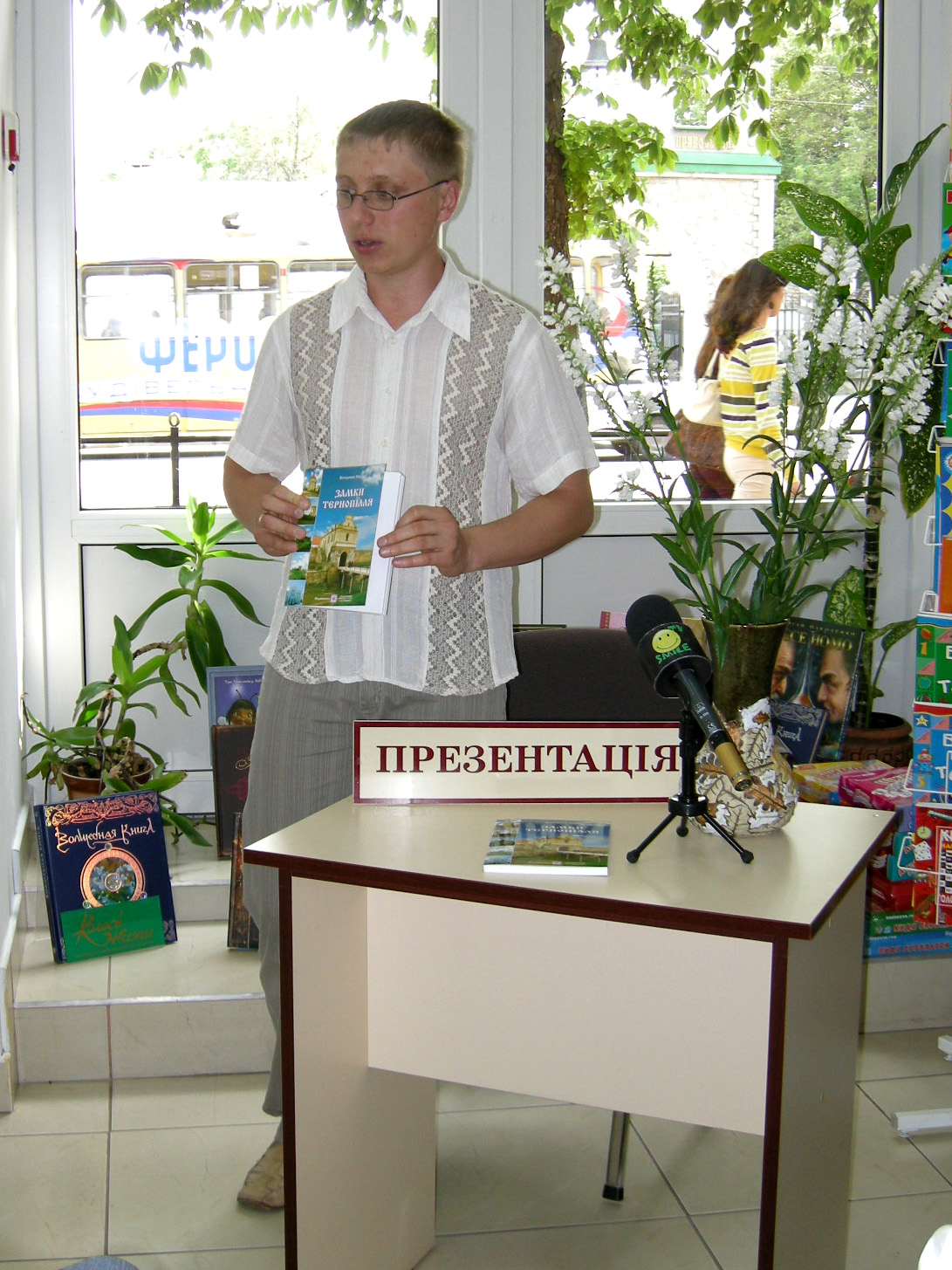 Презентація книги Володимира Мороза «Замки Тернопілля» у книгарні «Ярослав Мудрий» на вул. Руській (м. Тернопіль).